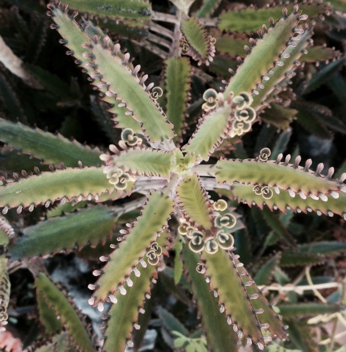 Kalanchoe x hougtonii